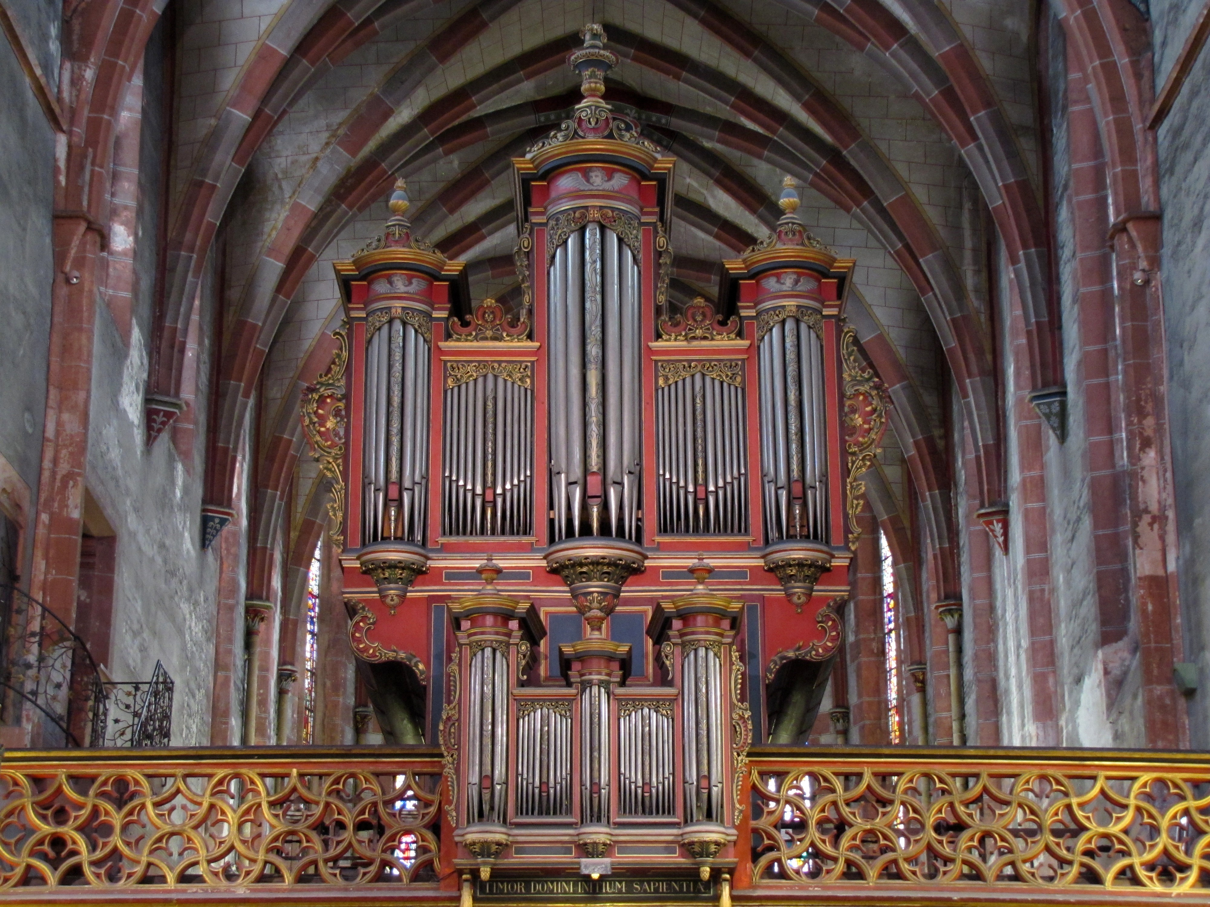 Alsace, Bas-Rhin, Église protestante Saint-Pierre-le-Jeune de Strasbourg (PA00085030)Orgue Jean-André Silbermann (1780) sur jubé, façade côté nef: This object is classé Monument Historique in the base Palissy, database of the French furniture patrimony of the French ministry of culture, under the references PM67001136 and buffet PM67000505 buffet.